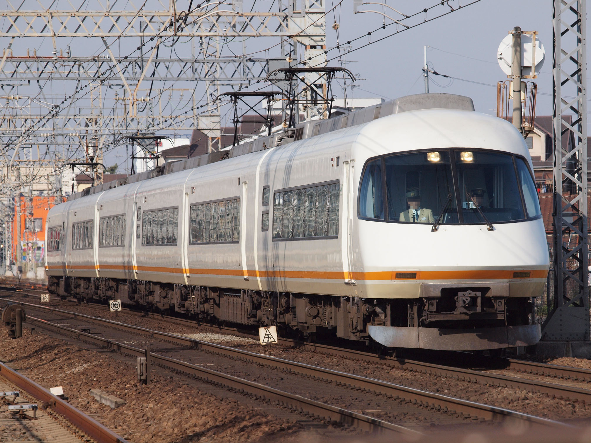 近鉄21000系電車（高安-恩智間で撮影） 2008年12月撮影。 機材：OLYMPUS E-30 + ZUIKO DIGITAL ED 50-200mm F2.8-3.5 撮影者：Kansai explorer 撮影後レタッチ・リサイズ